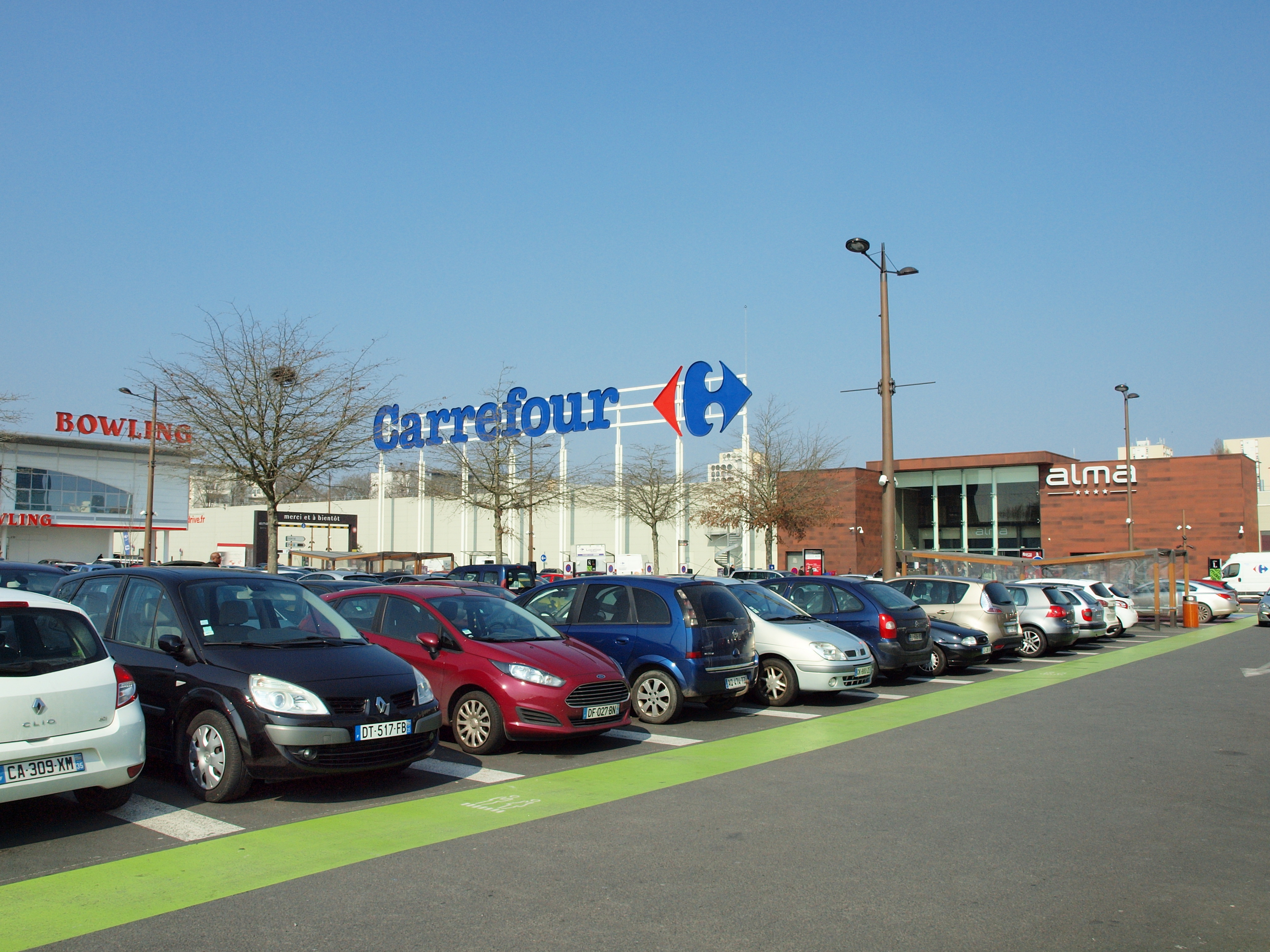 Rennes (Ille-et-Vilaine, France) ; centre commercial de l'Alma